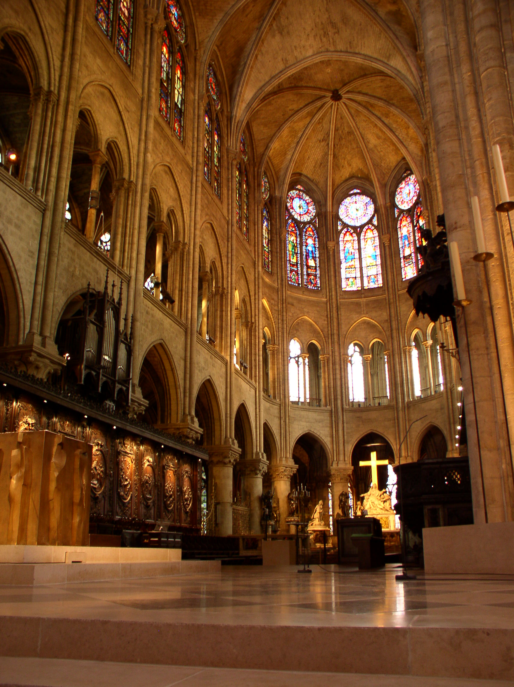 Notre Dame de Paris Altar